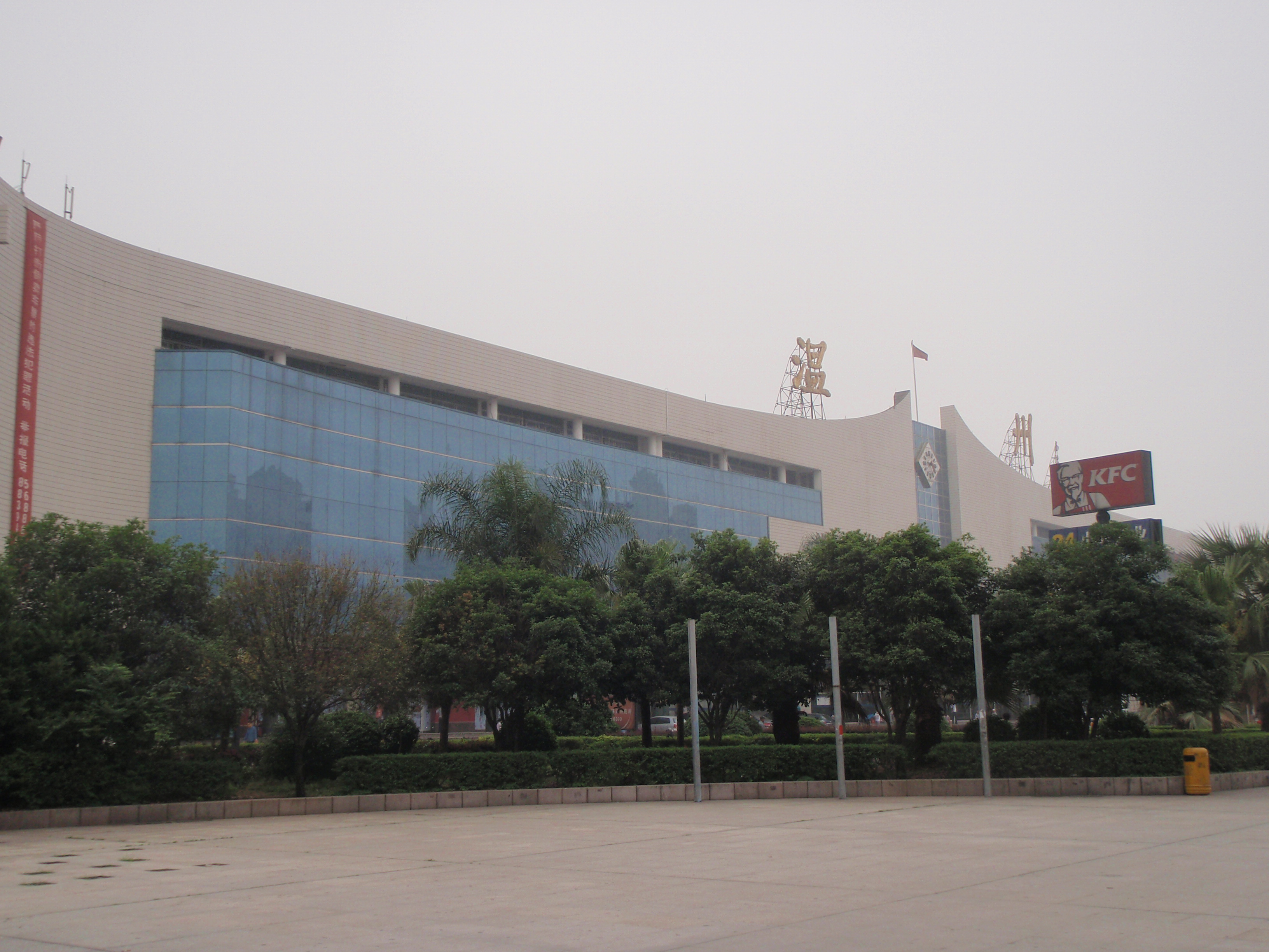 温州火车站